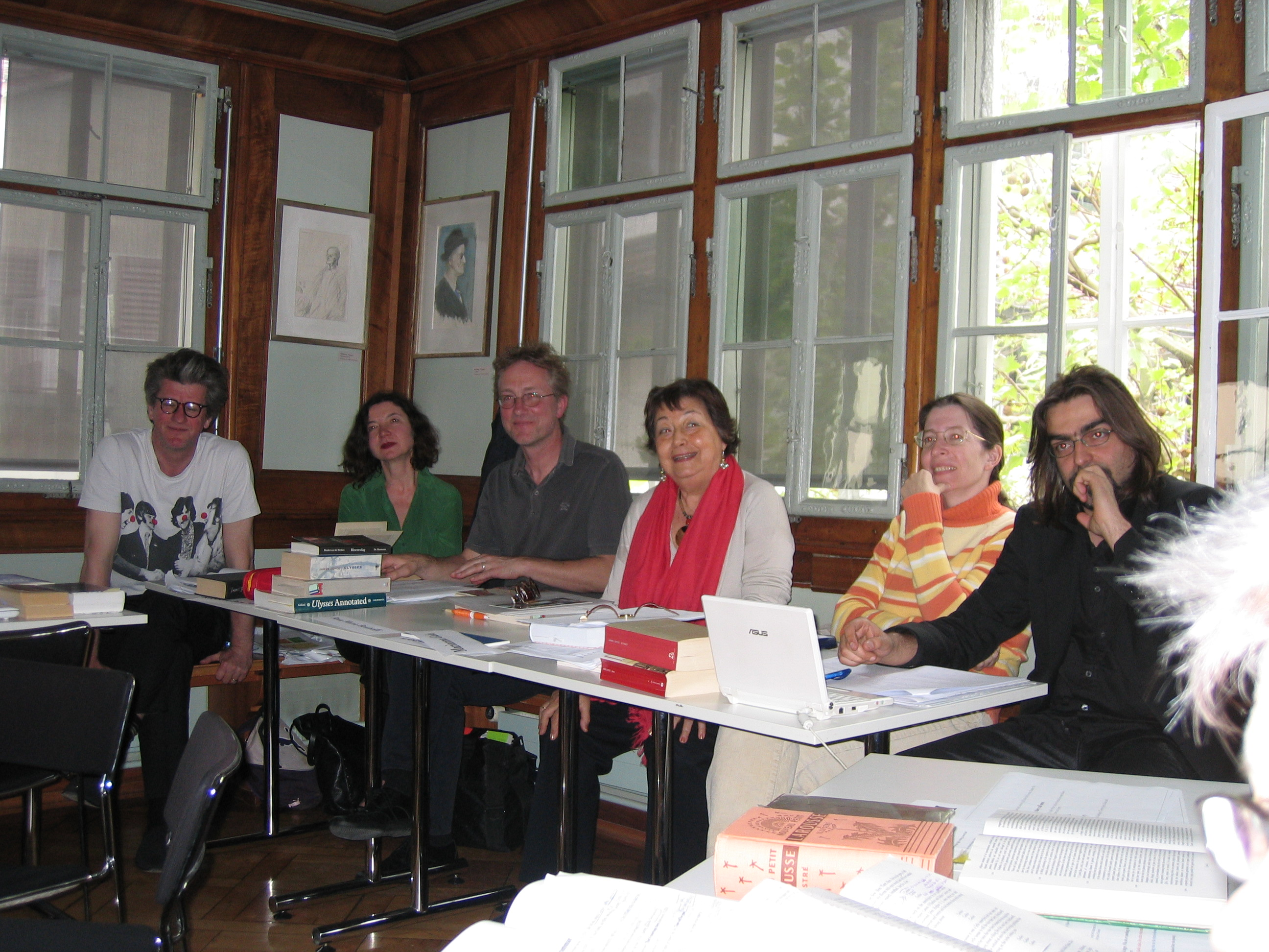 Übersetzer-Workshop in der Zürcher James Joyce Stiftung, Mai 2010